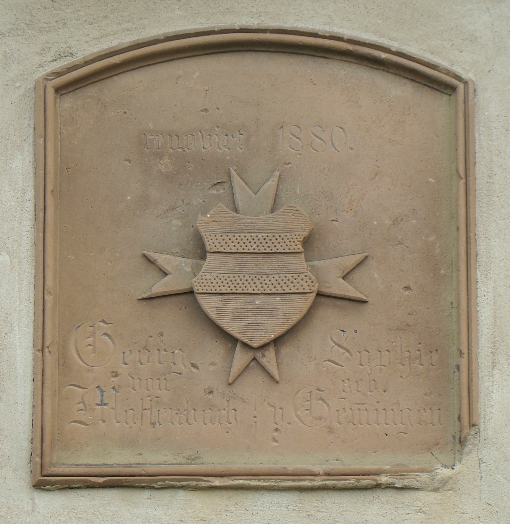 Inschriftenstein an der Zehntscheuer von Schloss Massenbach